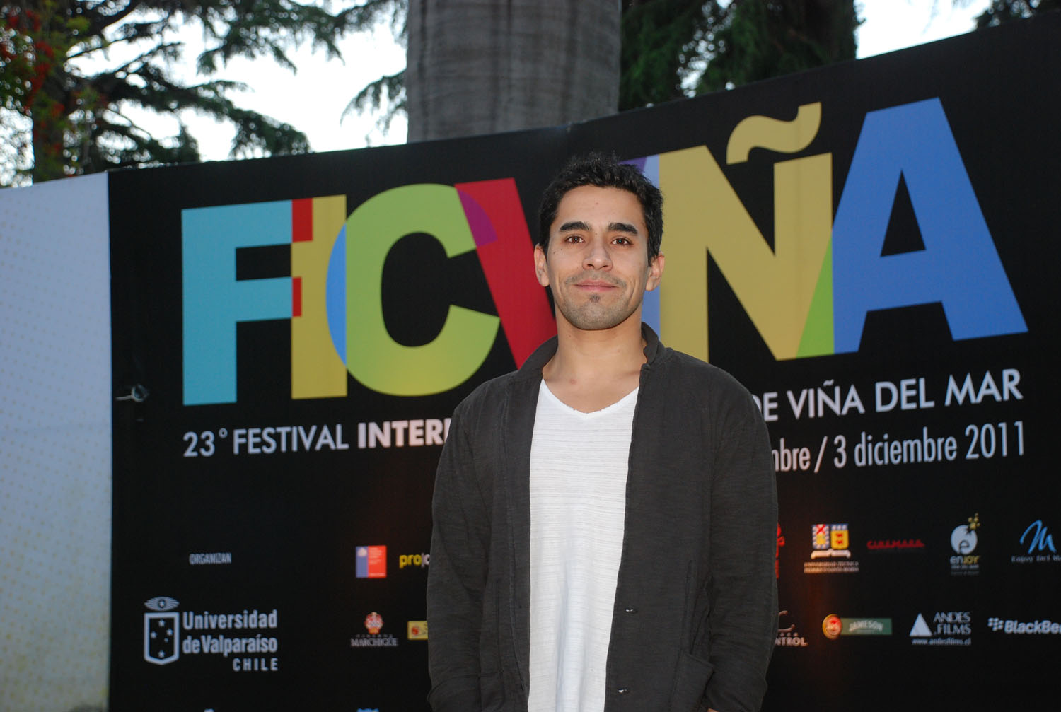 Quinta Vergara Inauguración FICVIÑA